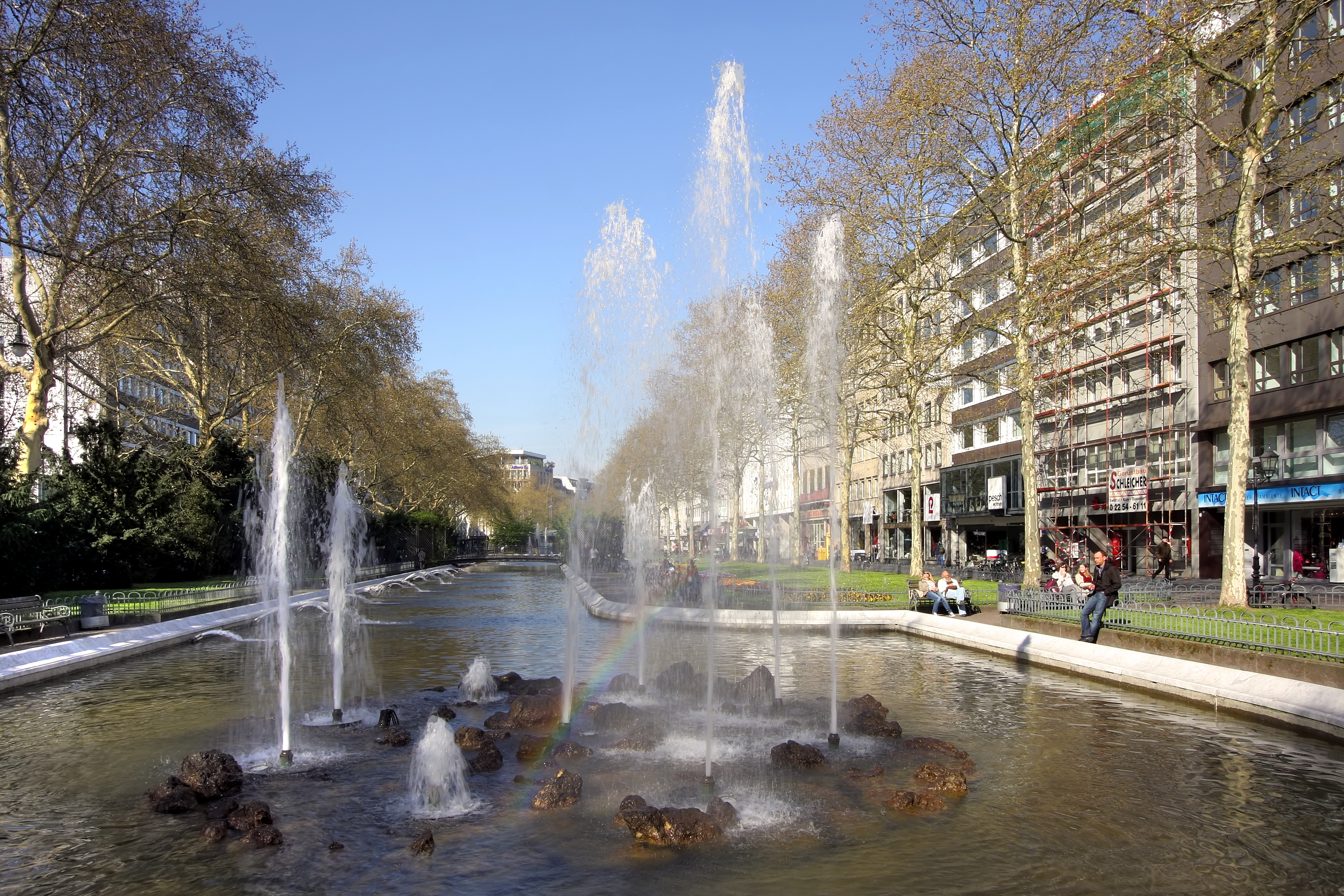 Grünanlagen mit Springbrunnen und Wasserfläche am Kaiser-Wilhelm-Ring , Köln